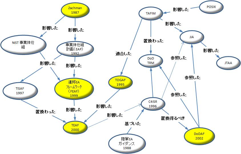 1980年代から2003年にかけての事業体仕組フレームワークの進化。